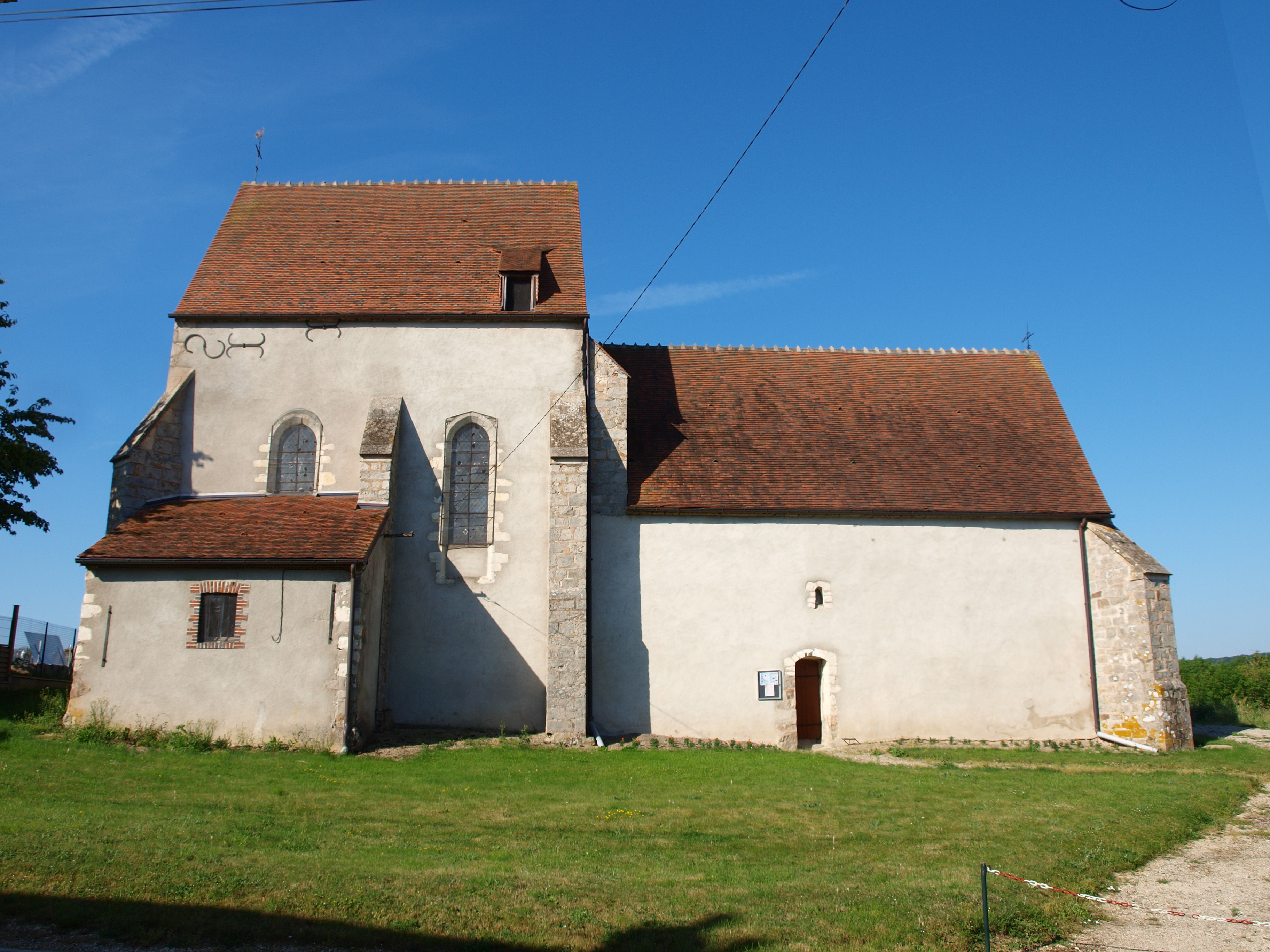 Paroy-sur-Tholon (Yonne, France)